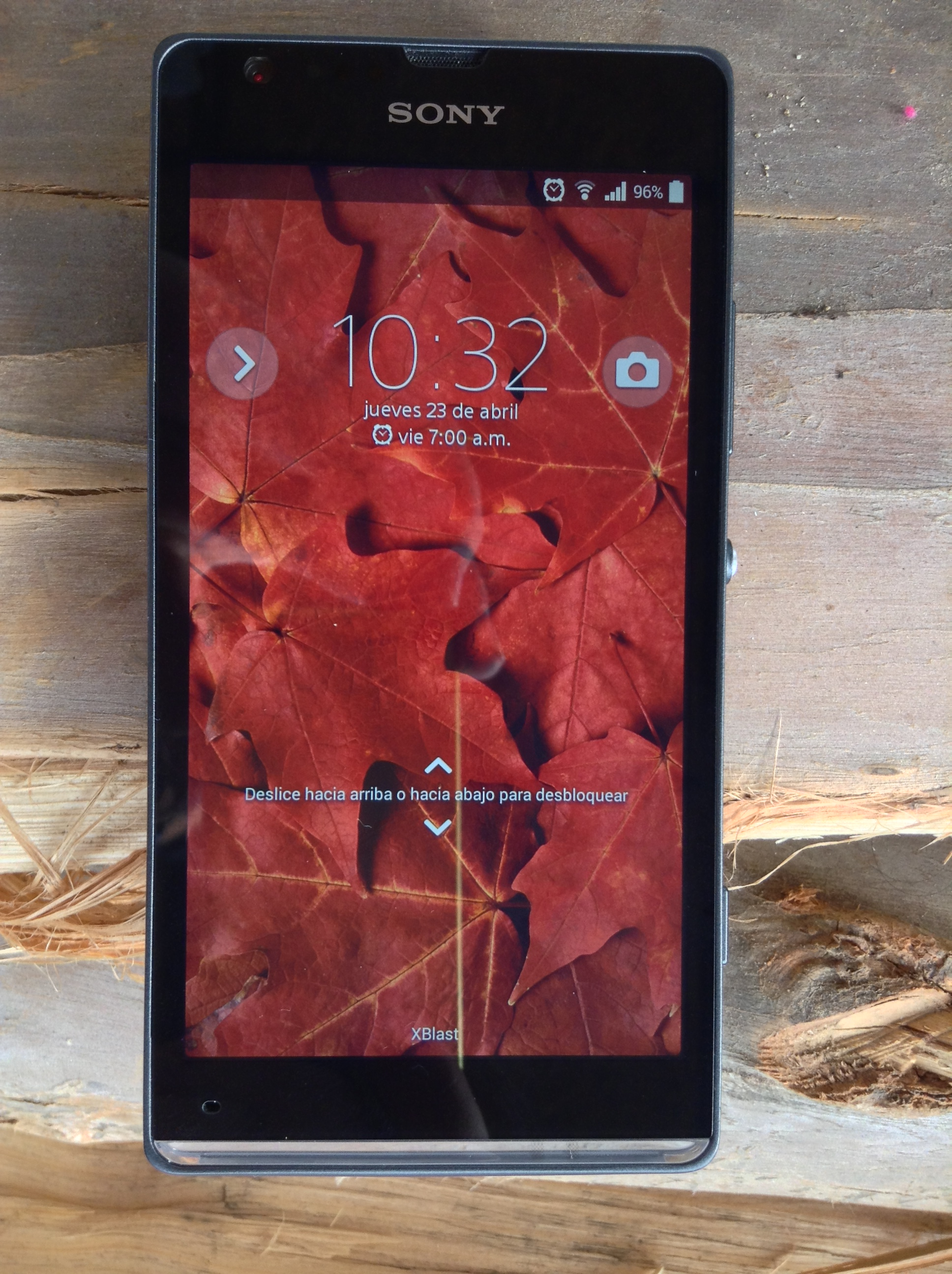 frente xperia SP